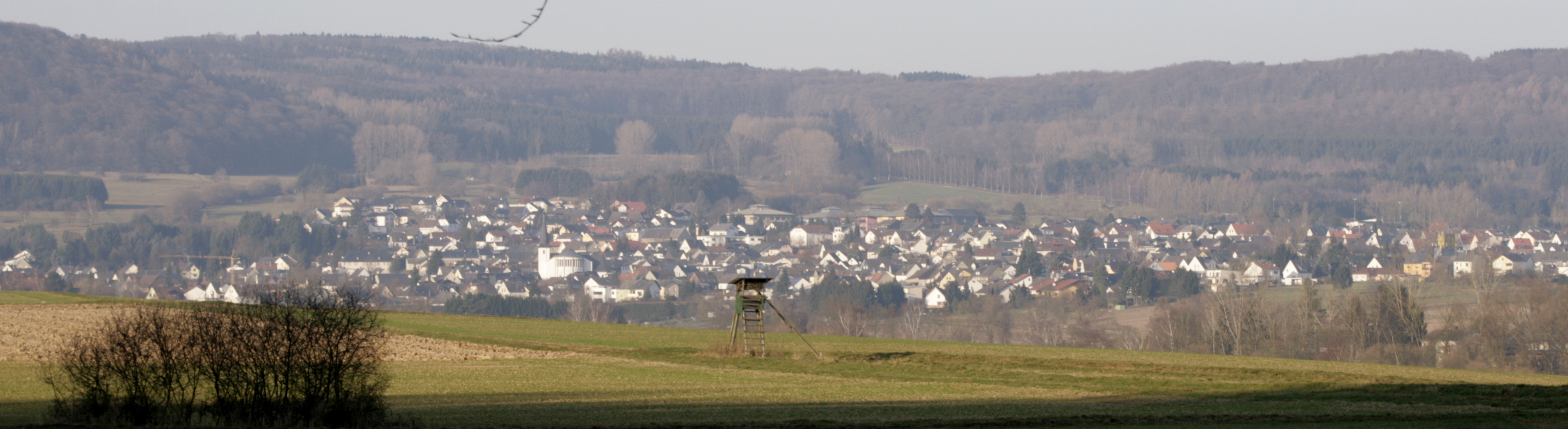 Ortsansicht von Dornburg-Frickhofen, Deutschland, von Süden aus gesehen